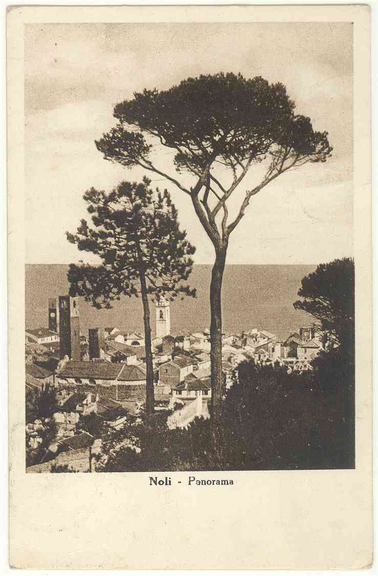 Noli, Savona, Ligurai, Italia - panorama 1941